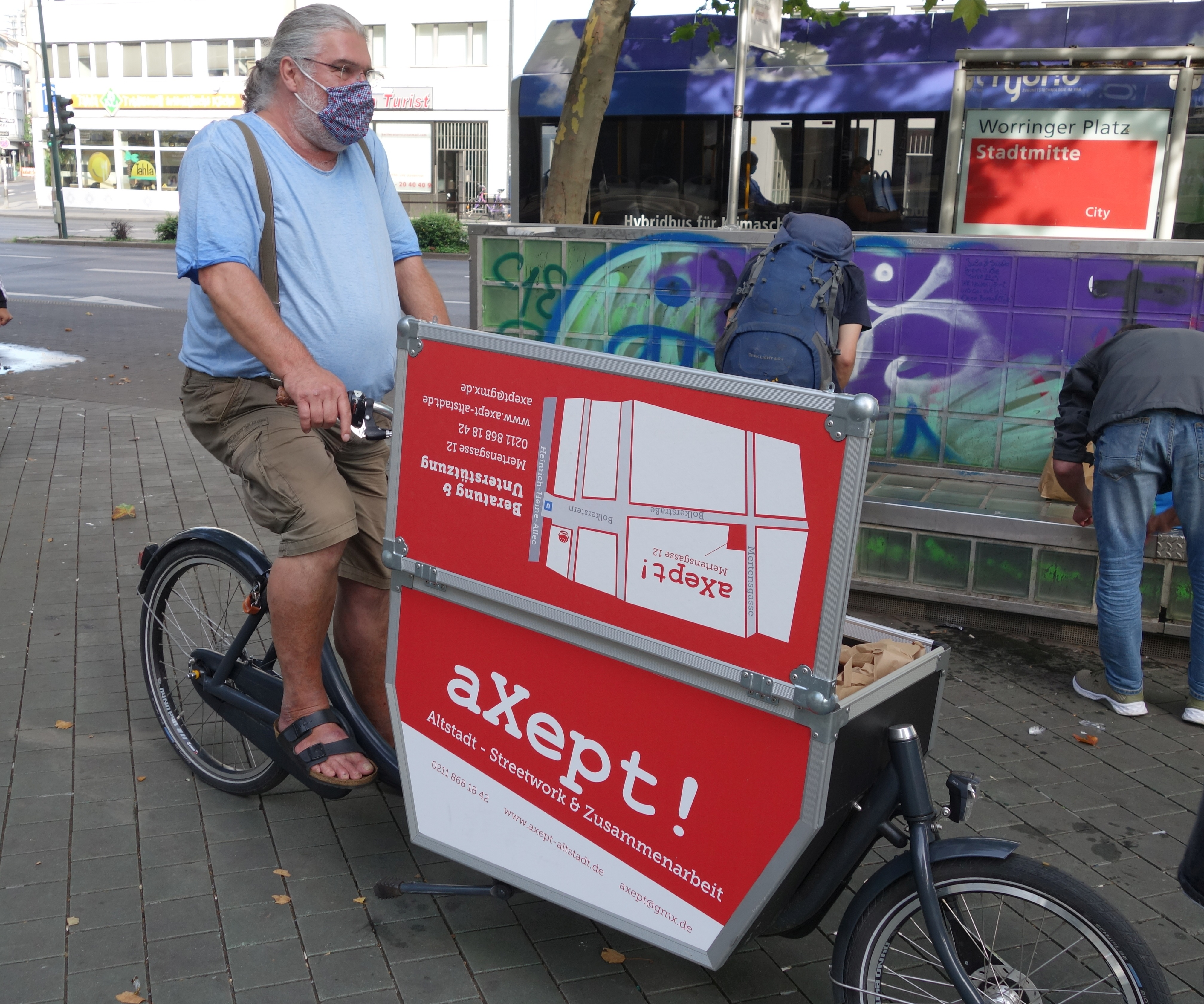 Worringer Platz in Düsseldorf. Fotoserie vom 19. August 2020, morgens.